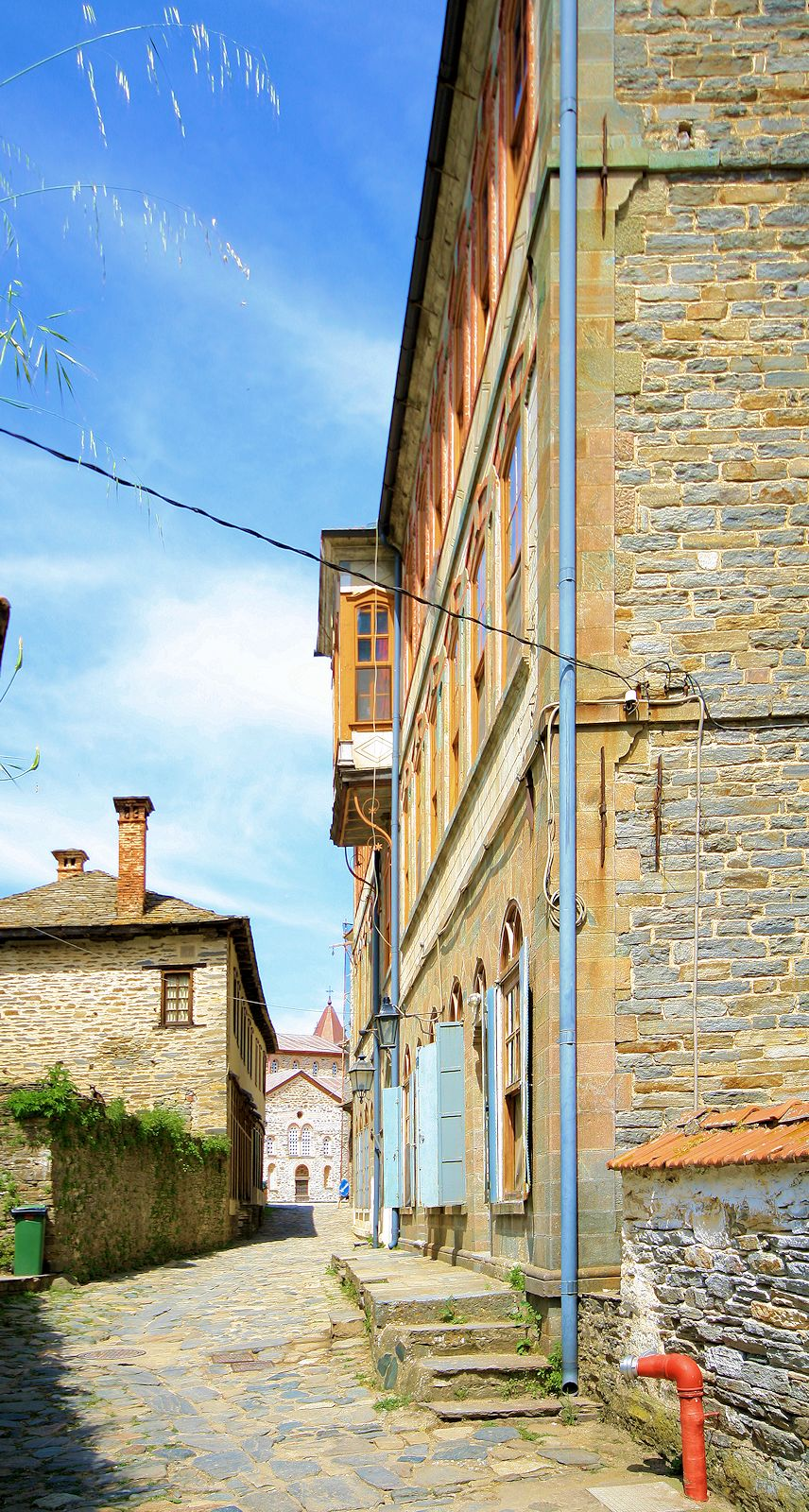 Κέντρο Υγείας στις Καρυές Αγίου Όρους